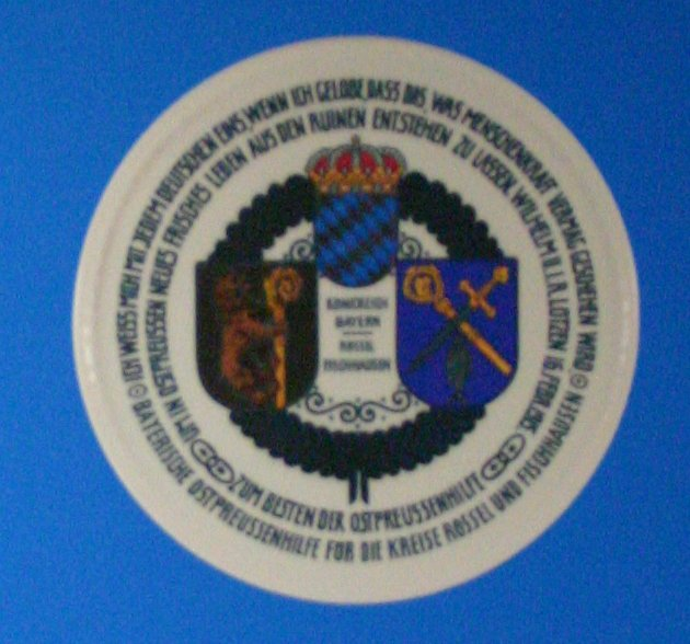 Patenschaftsteller